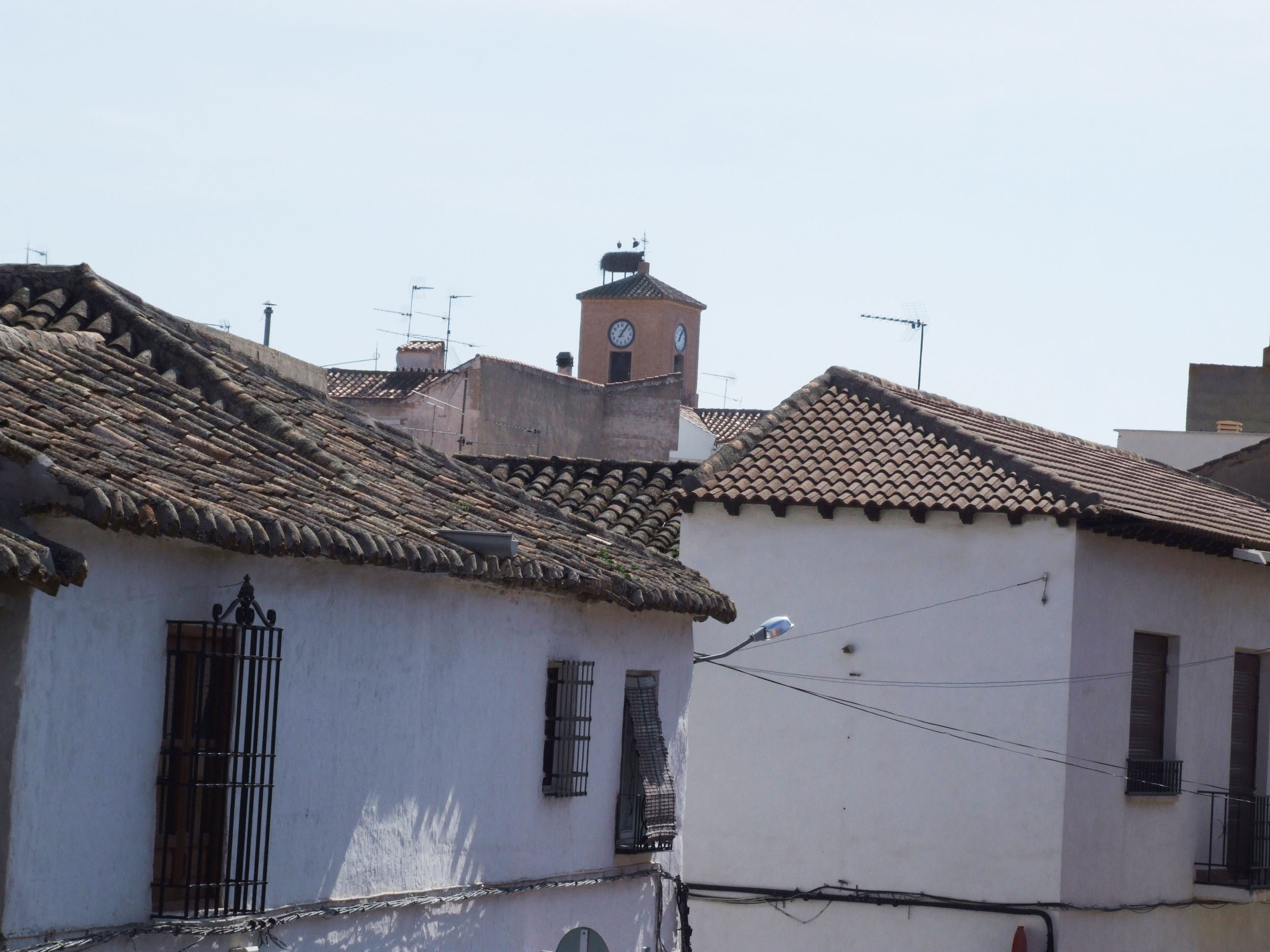 Torre del reloj de Iglesia de San Felipe y Santiago